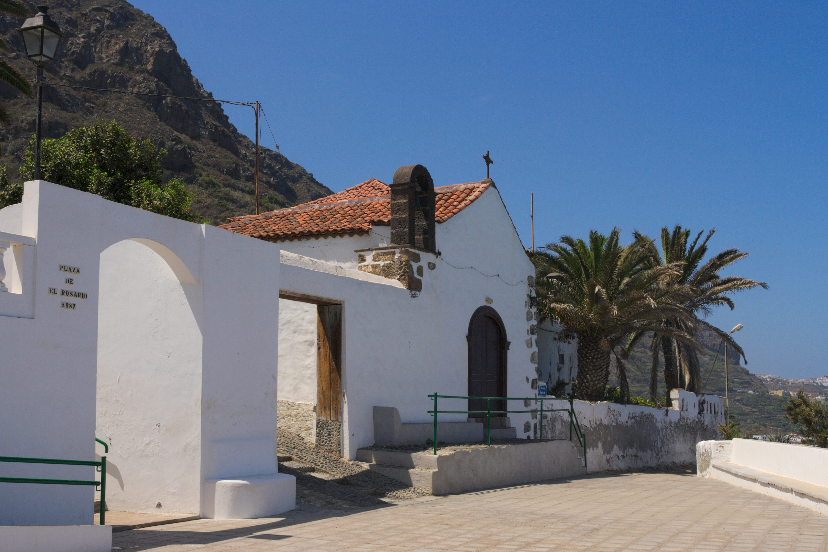 Ermita de El Rosario, San Juan de la Rambla